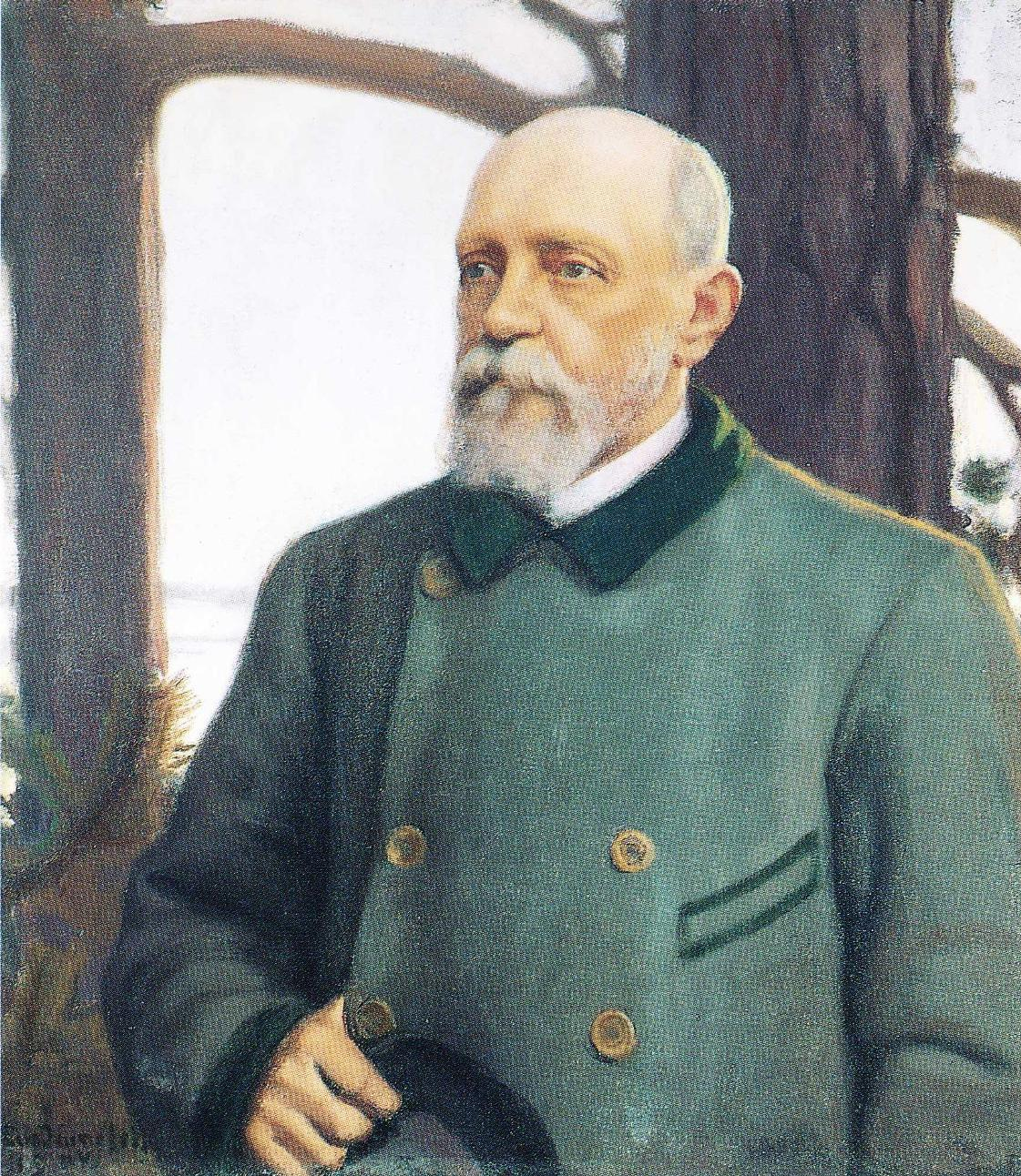 Evon metsäopiston johtaja Anton Blomqvist (1836–1904), Eero Järnefeltin postuumi muotokuva. Blomqvistin oppilaat lahjoittivat muotokuvan Evon metsäopistolle, josta se on siirtynyt Helsingin yliopiston kokoelmiin. Metsätalossa säilytetty maalaus vahingoittui vuoden 1944 pommituksessa ja konservoitiin vuonna 1971.